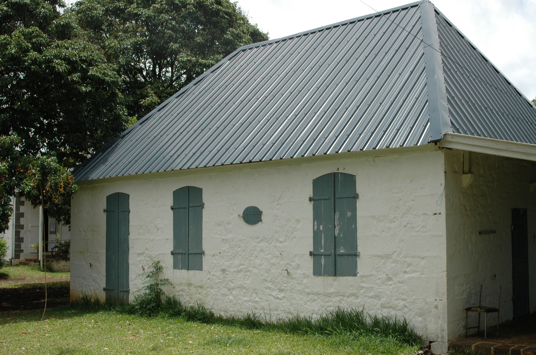 L'ancien presbytère de l'église Saint-François d'Assise